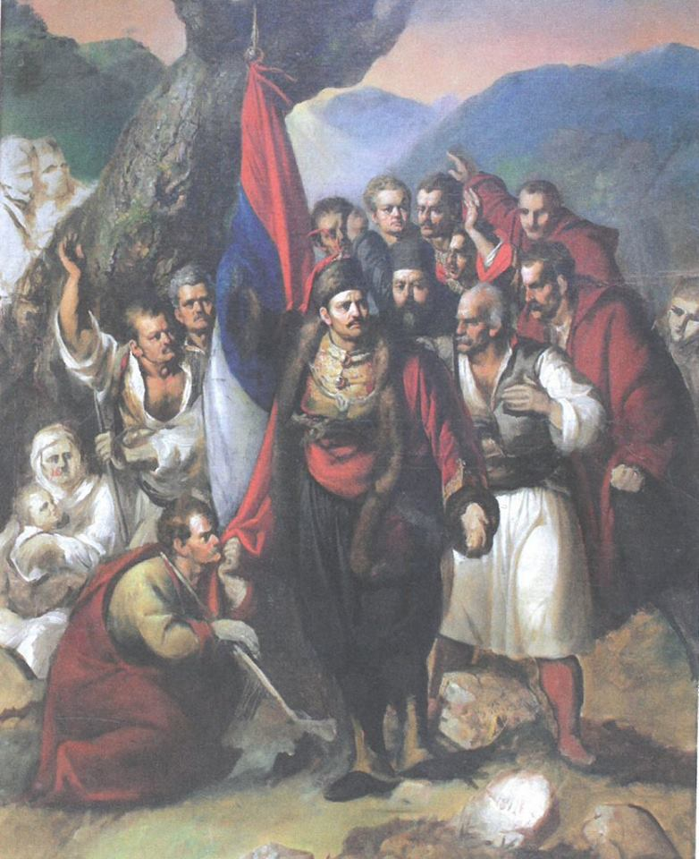 Таковски устанак, уље на платну Ђуре Јакшића, 1876-1878, Народни музеј у Београду.